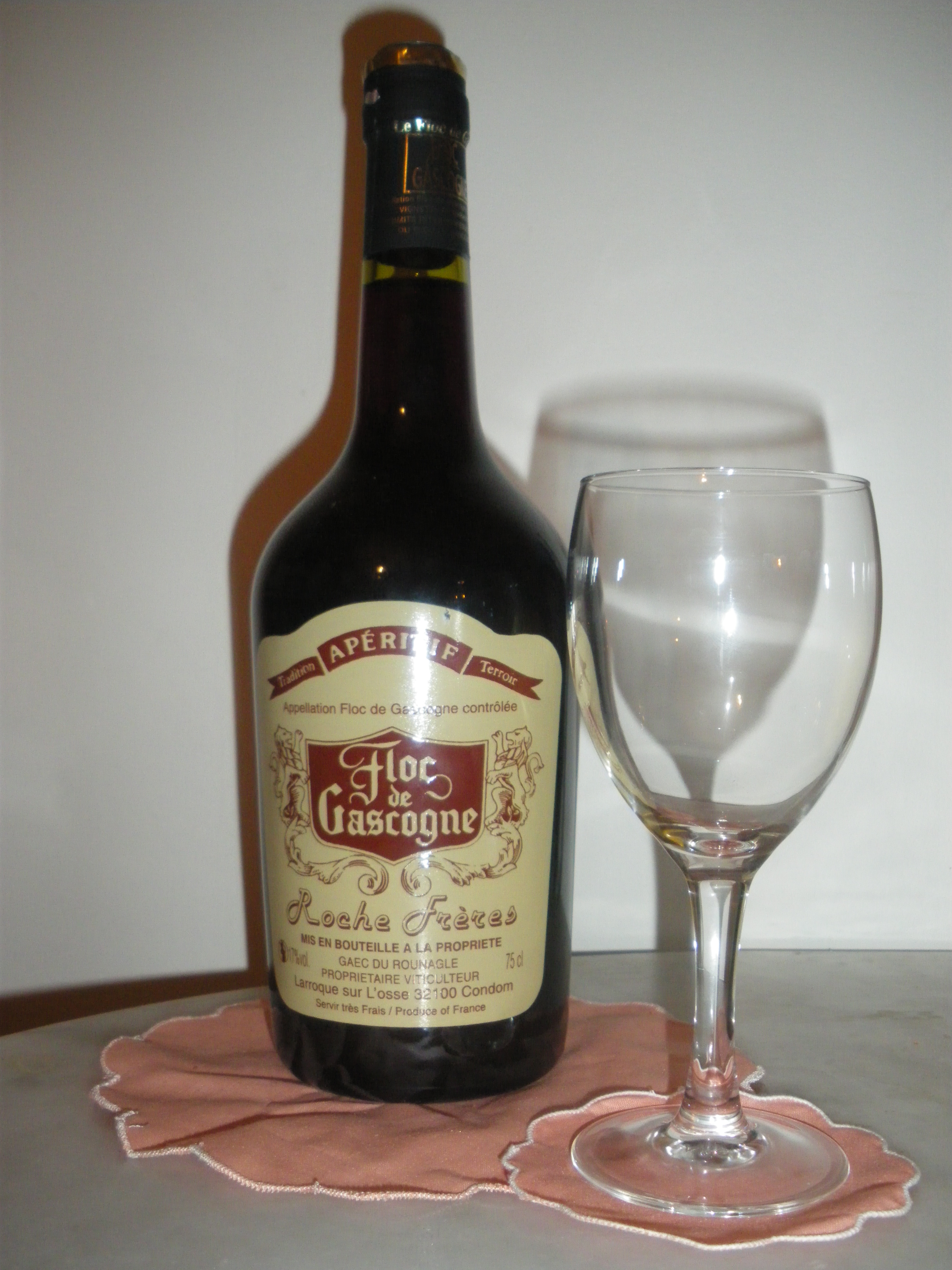 Floc de Gascogne, apéritif à base d'Armagnac